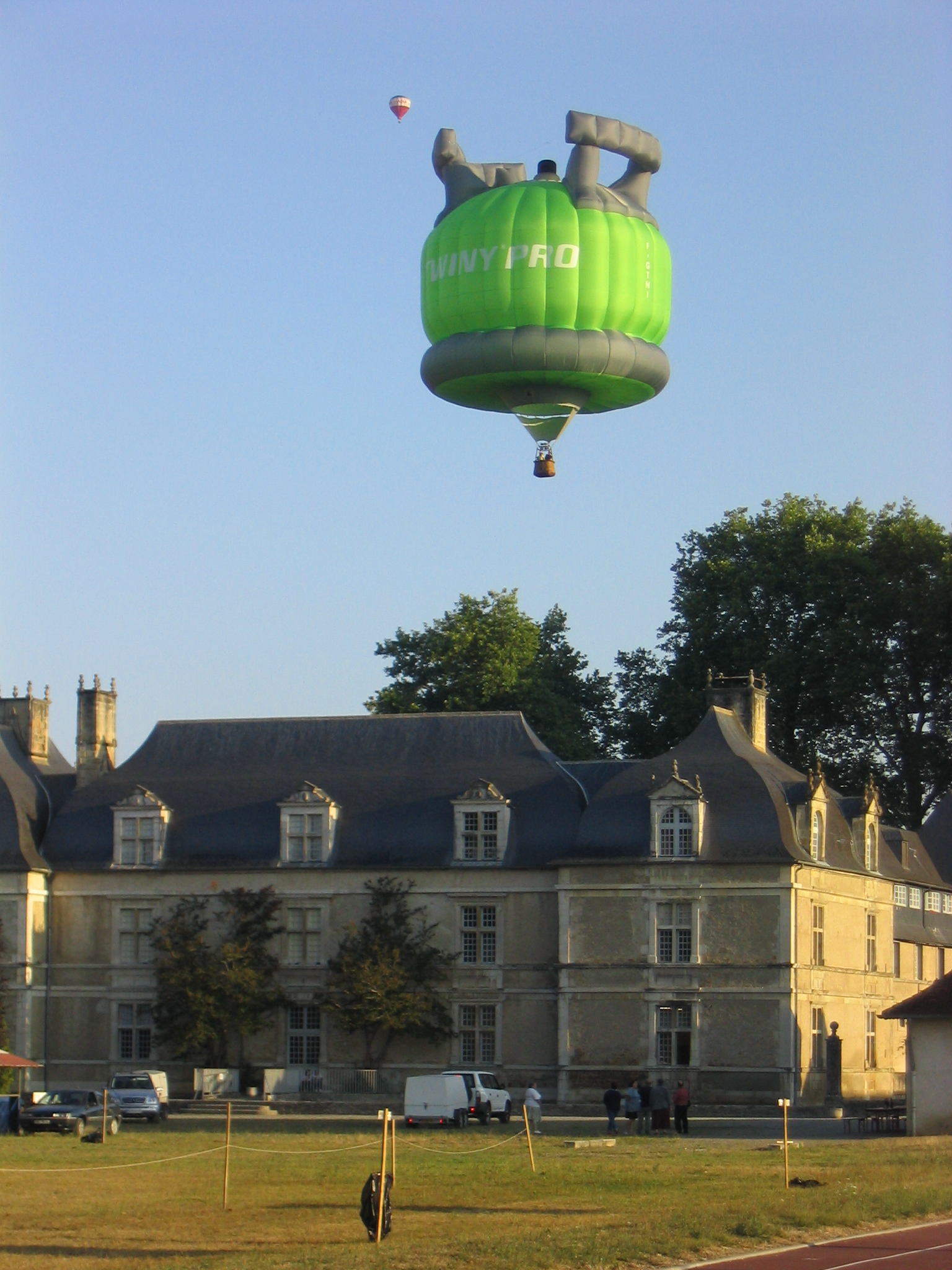 Montgolfière survolant le château d'Audaux.